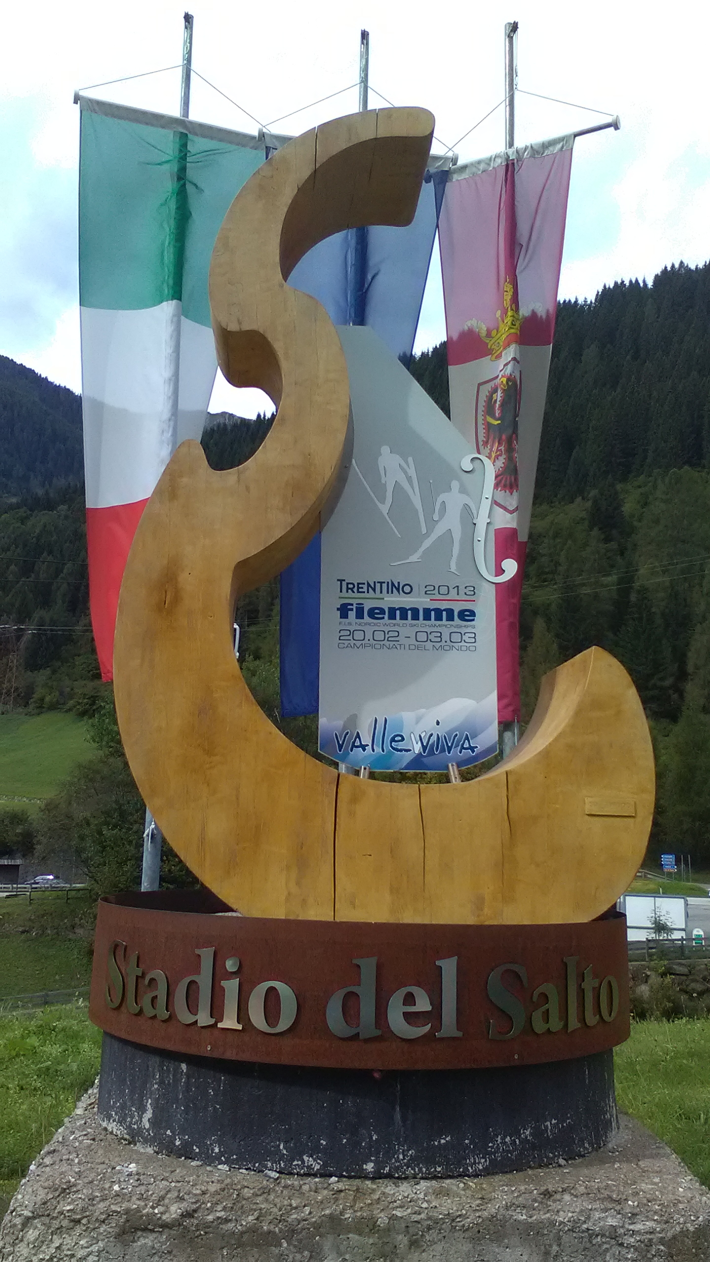 Scultura dei Campionati del mondo di sci nordico Val di Fiemme 2013 presso lo stadio del salto di Predazzo. Il simbolo rappresenta la forma di un violino realizzato con il legno della Val di Fiemme